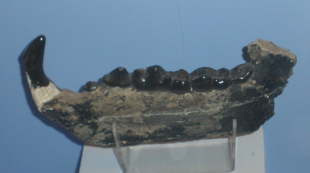 Fossil of Hyaenarctos, an extinct mammal- Took the picture at Museo di Paleontologia di Firenze